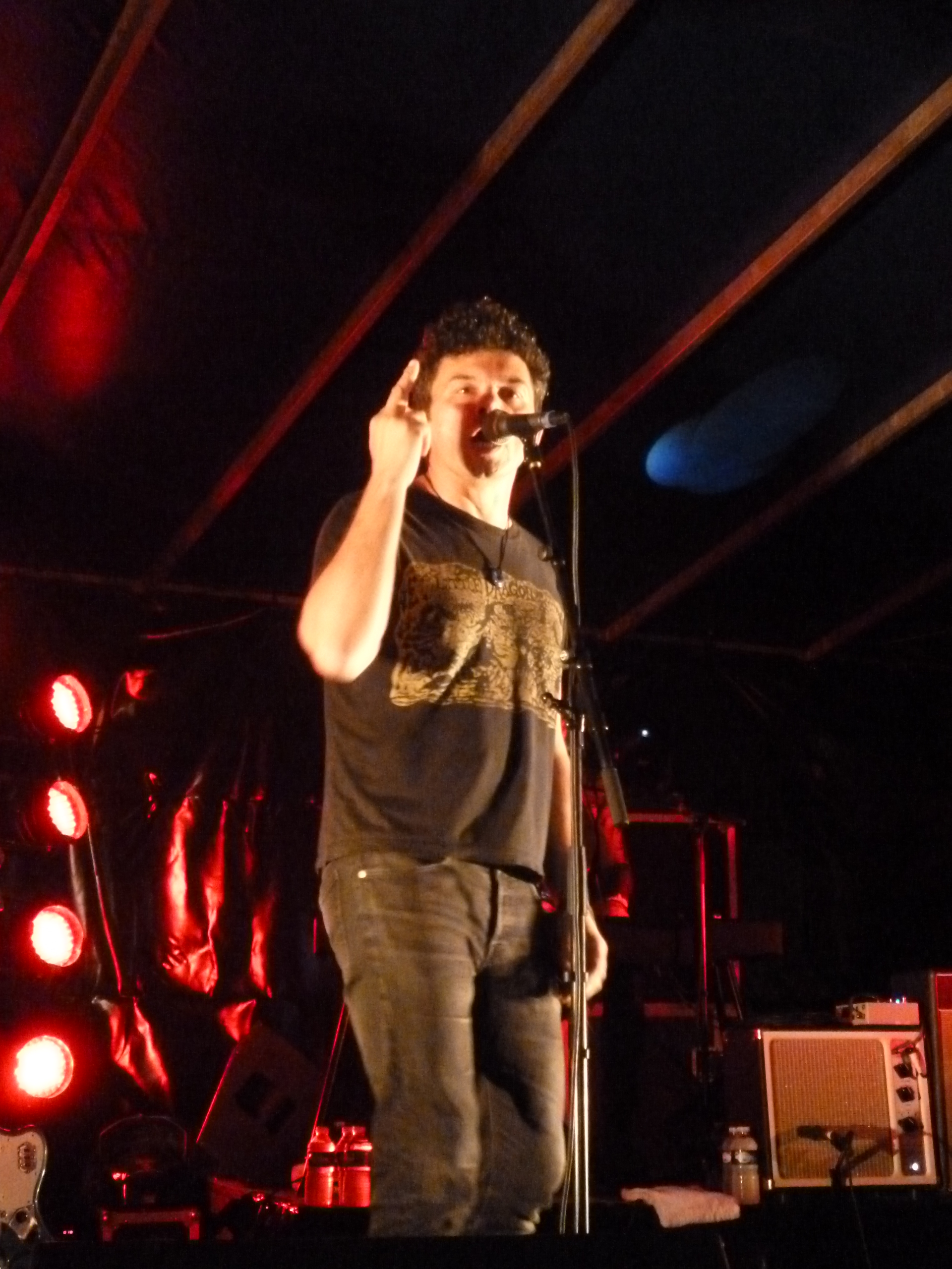 Le chanteur français Romain Humeau, en concert à Maignelay-Montigny (Oise), le samedi 24 juin 2017.